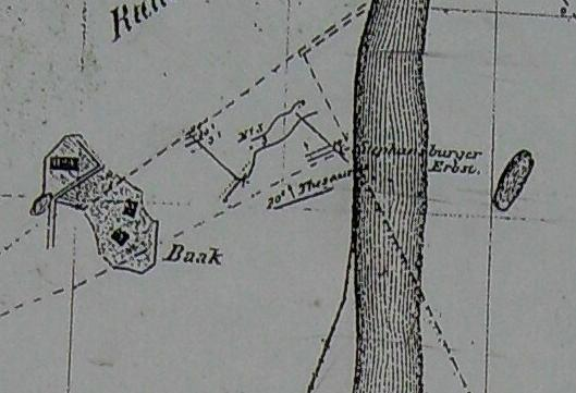 Flözkarte Winz-Baak von 1763, Ausschnitt